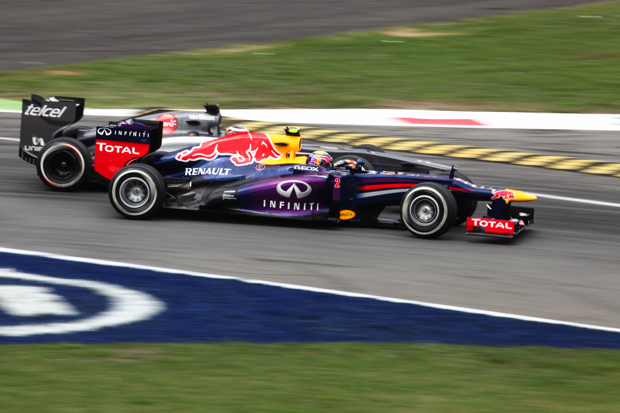 Mark Webber (Red Bull) Overtaking Nico Hulkenberg (Sauber)